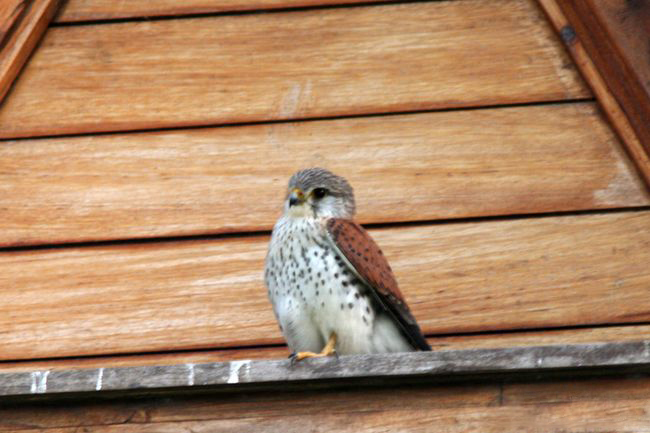 Crécerelle malgache